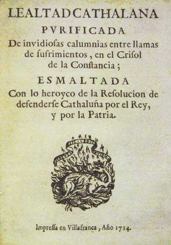 Lealtad Catalana purificada de envidiosas calumnias